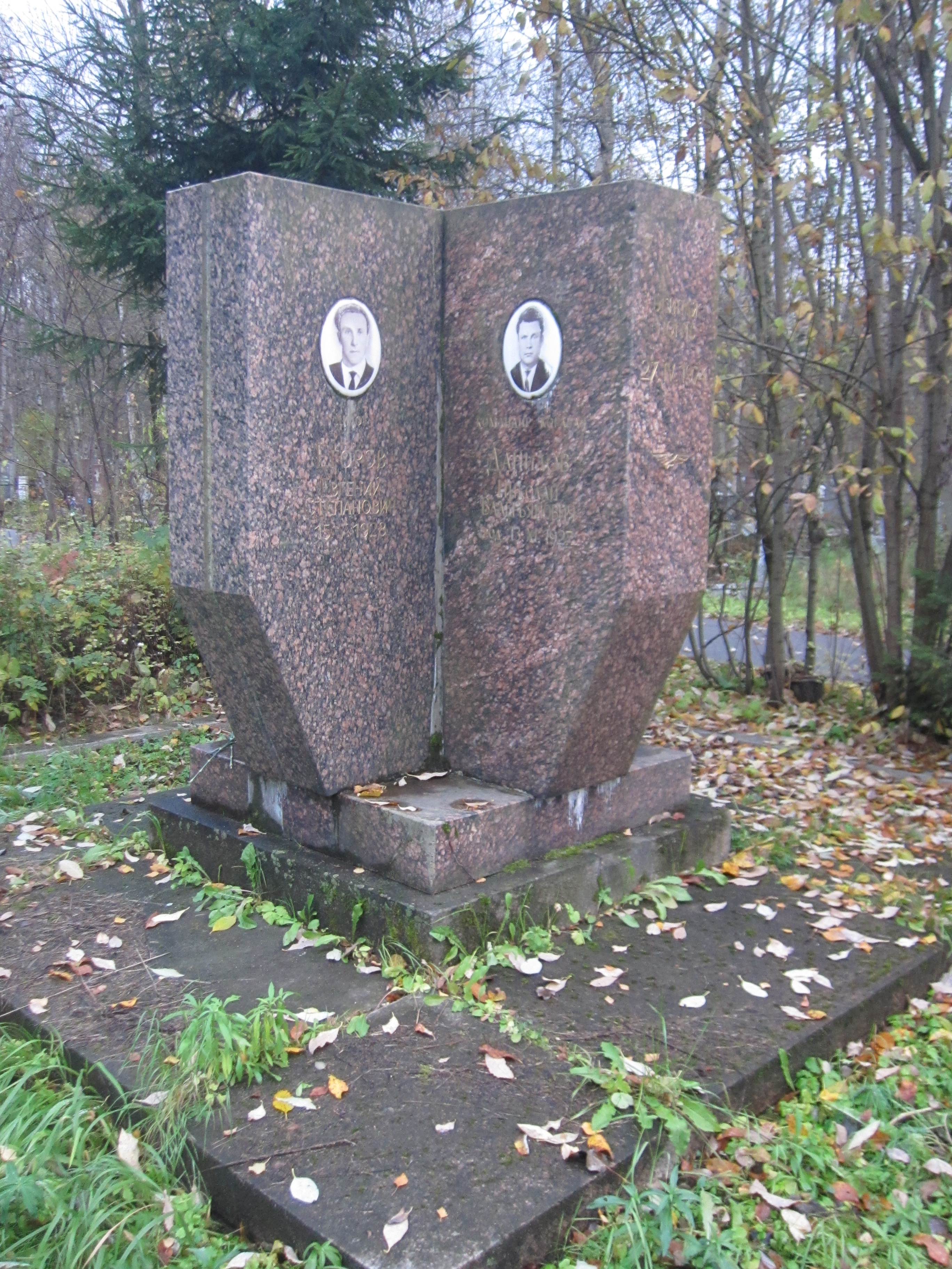 Мемориал экипажу Ил-18В, разбившегося 27 апреля 1974 года близ аэропорта Пулково